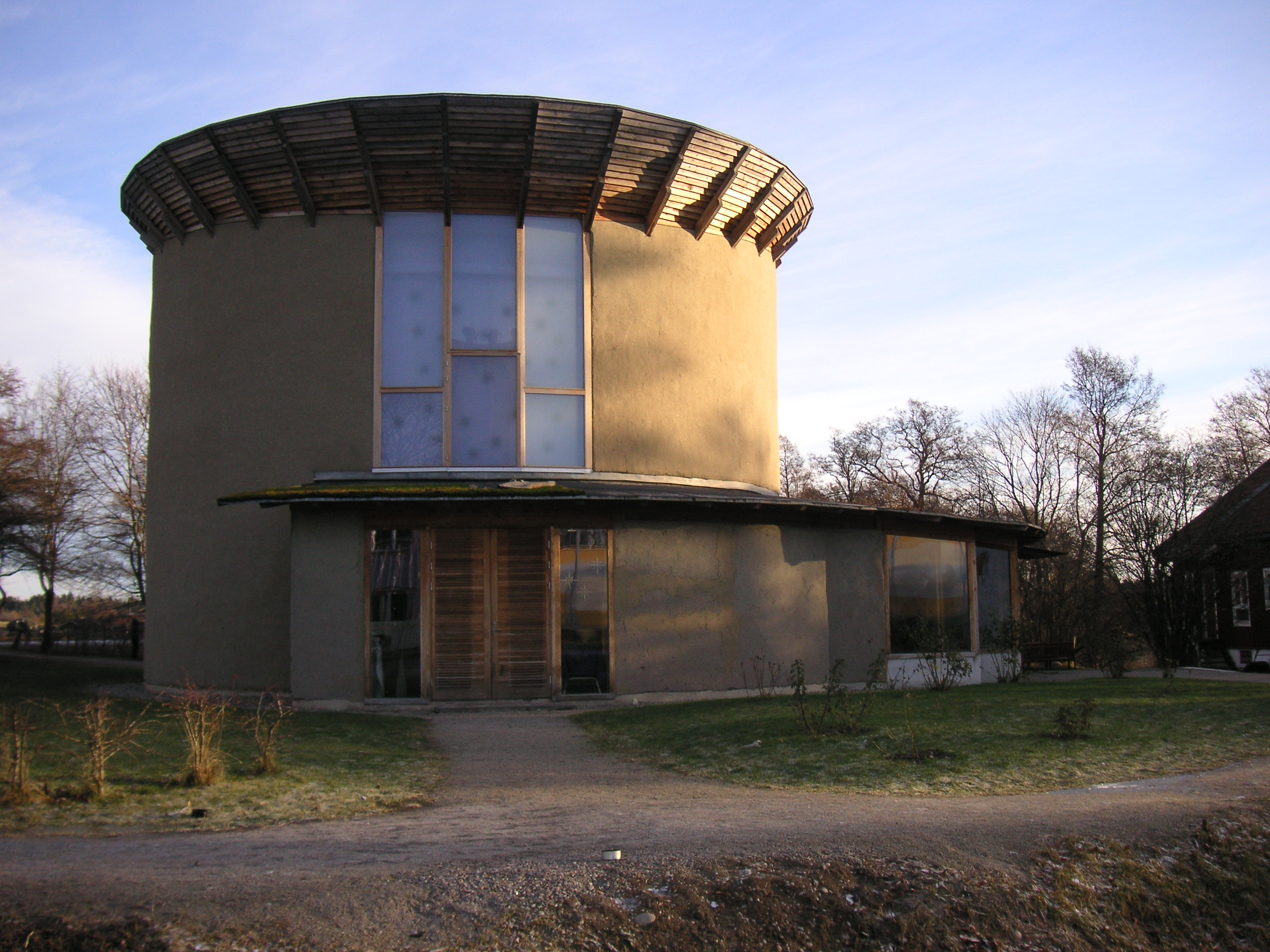 Kristofferuskyrkan, Kristensamfundets kyrka vid Saltå, Järna. foto: konrad Breidenstein, Järna, 2005-12-25